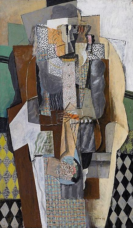 Fille assise au bouquet de fleurs (1919) cubist painting by Henri Hayden